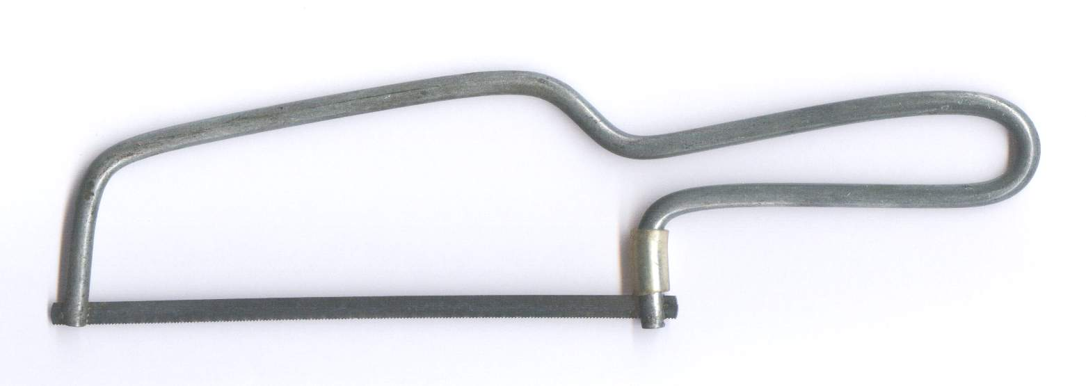 Juniorzaagje, standaard juniorzaagje. Zelf ingescand.